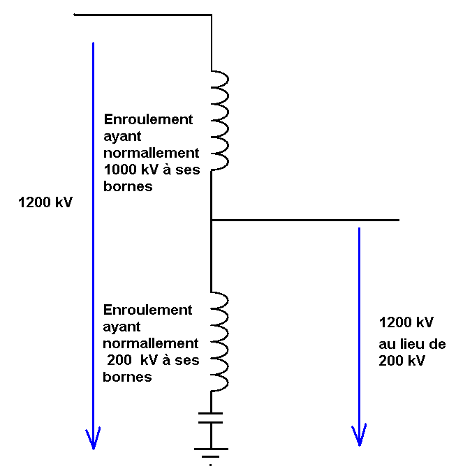 autotransformateur avec l'enroulement secondaire ouvert